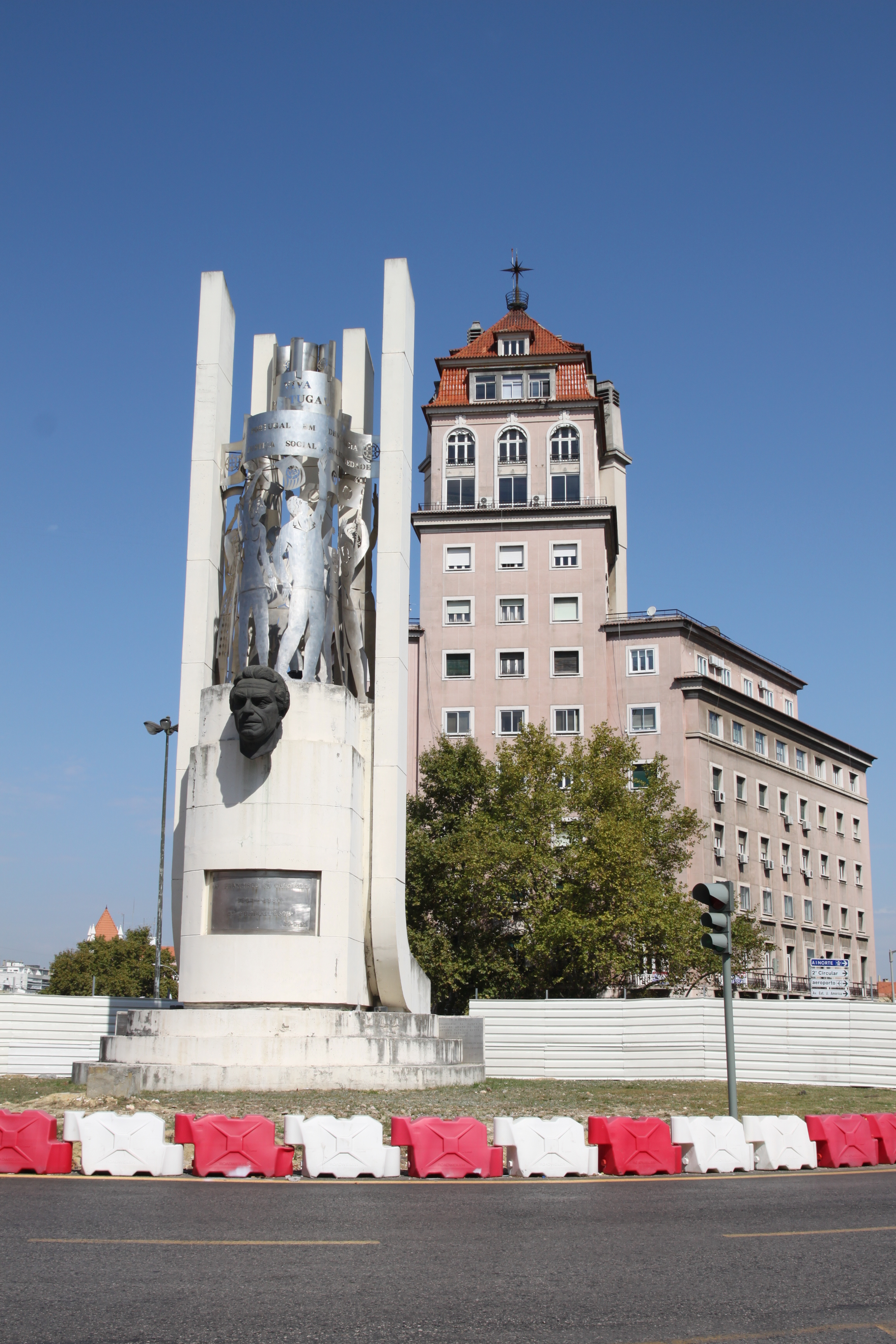 Praça do Areeiro This file was uploaded for Wiki Loves Monuments in Portugal with the unique identifier 97007788.